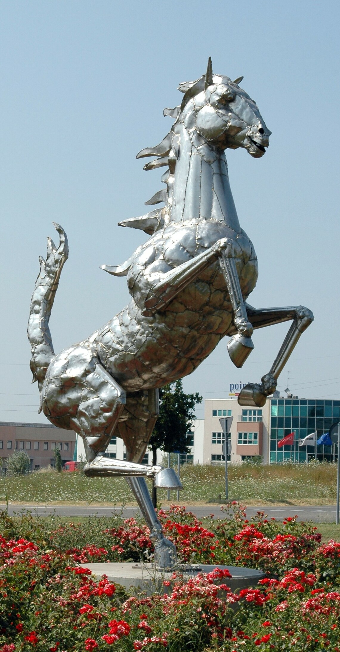 Maranello, Emilia Romagna, Italia